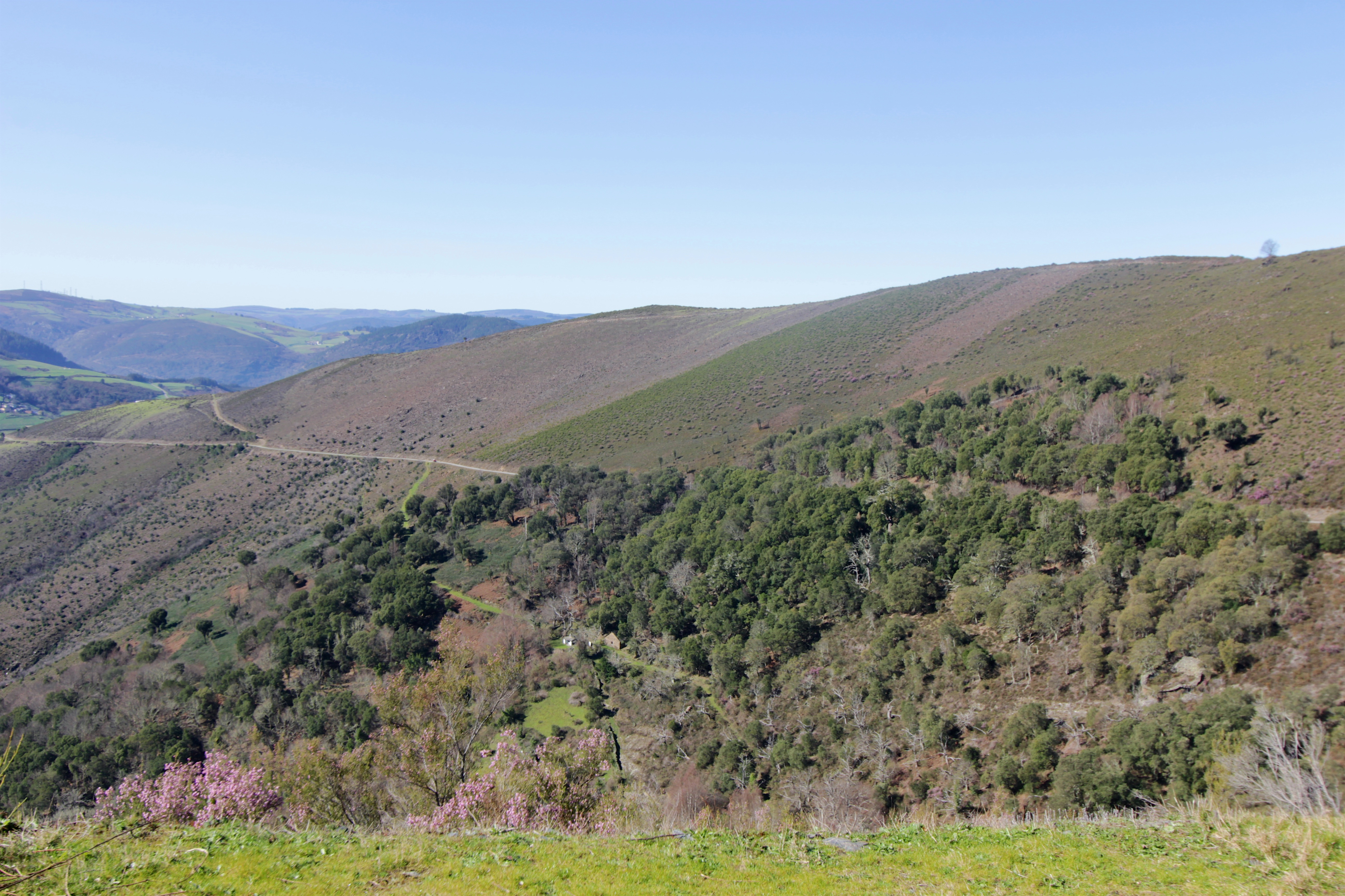 Alcornocal situado en el principado de Asturias. Espacio natural protegido y monumento natural